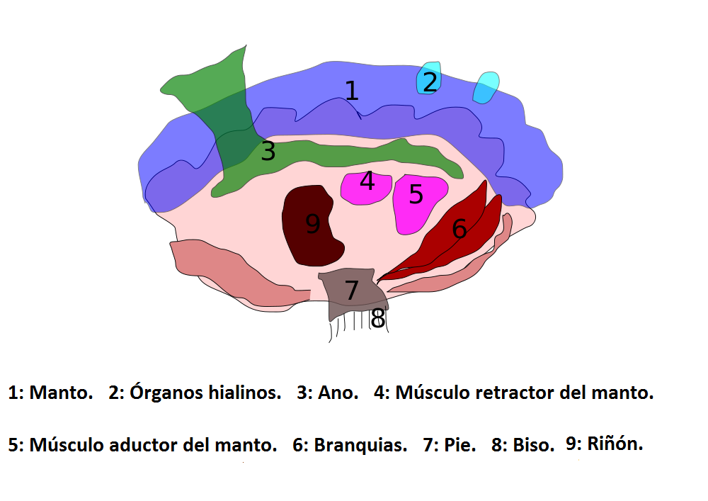 Adaptación al español de Giant clam anatomy.svg, de Wikicommons